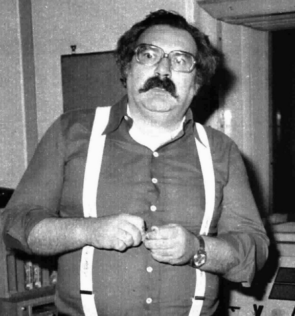 Italian actor Mario Maranzana